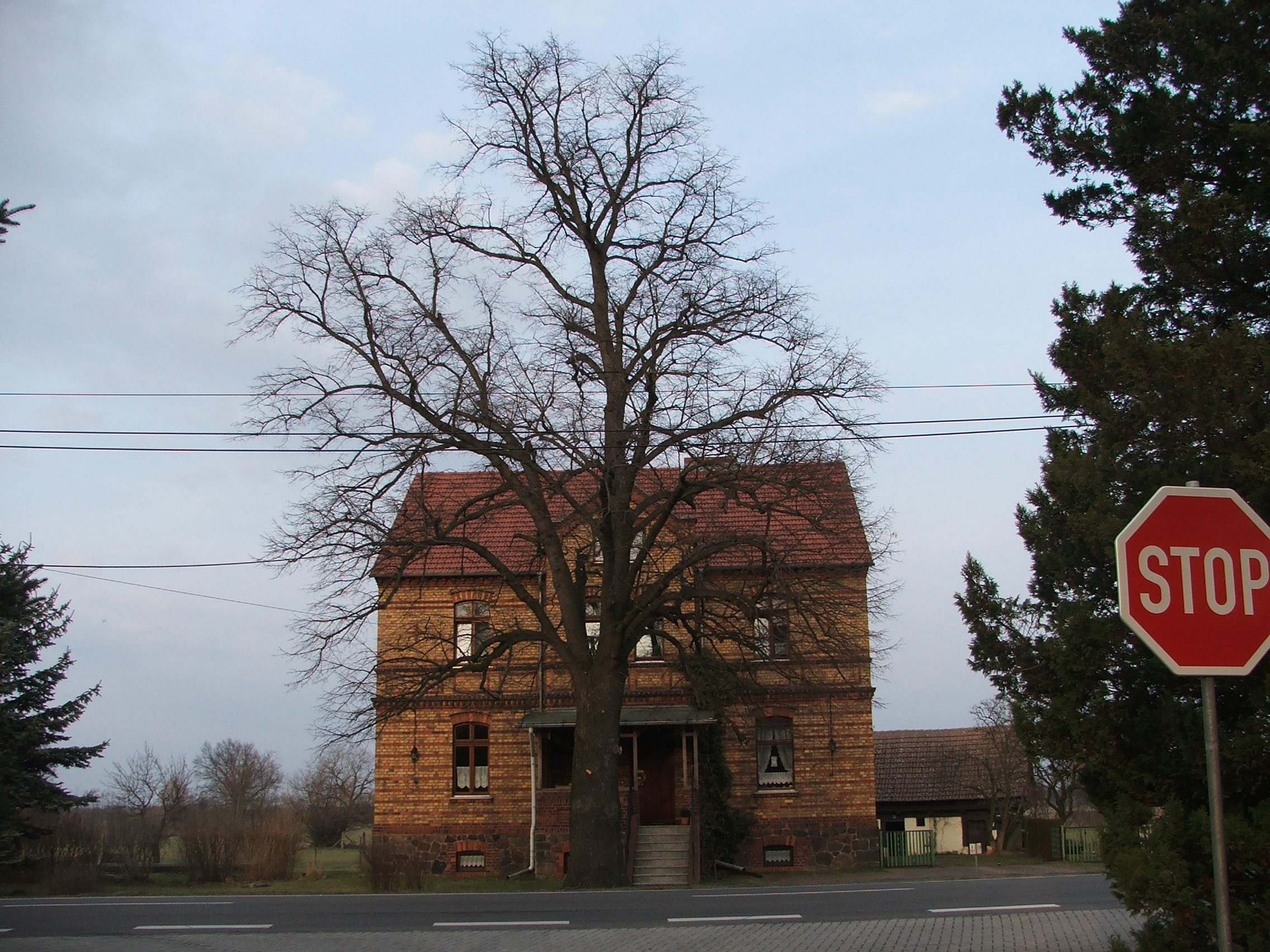 altes Pfarramt Langennaundorf